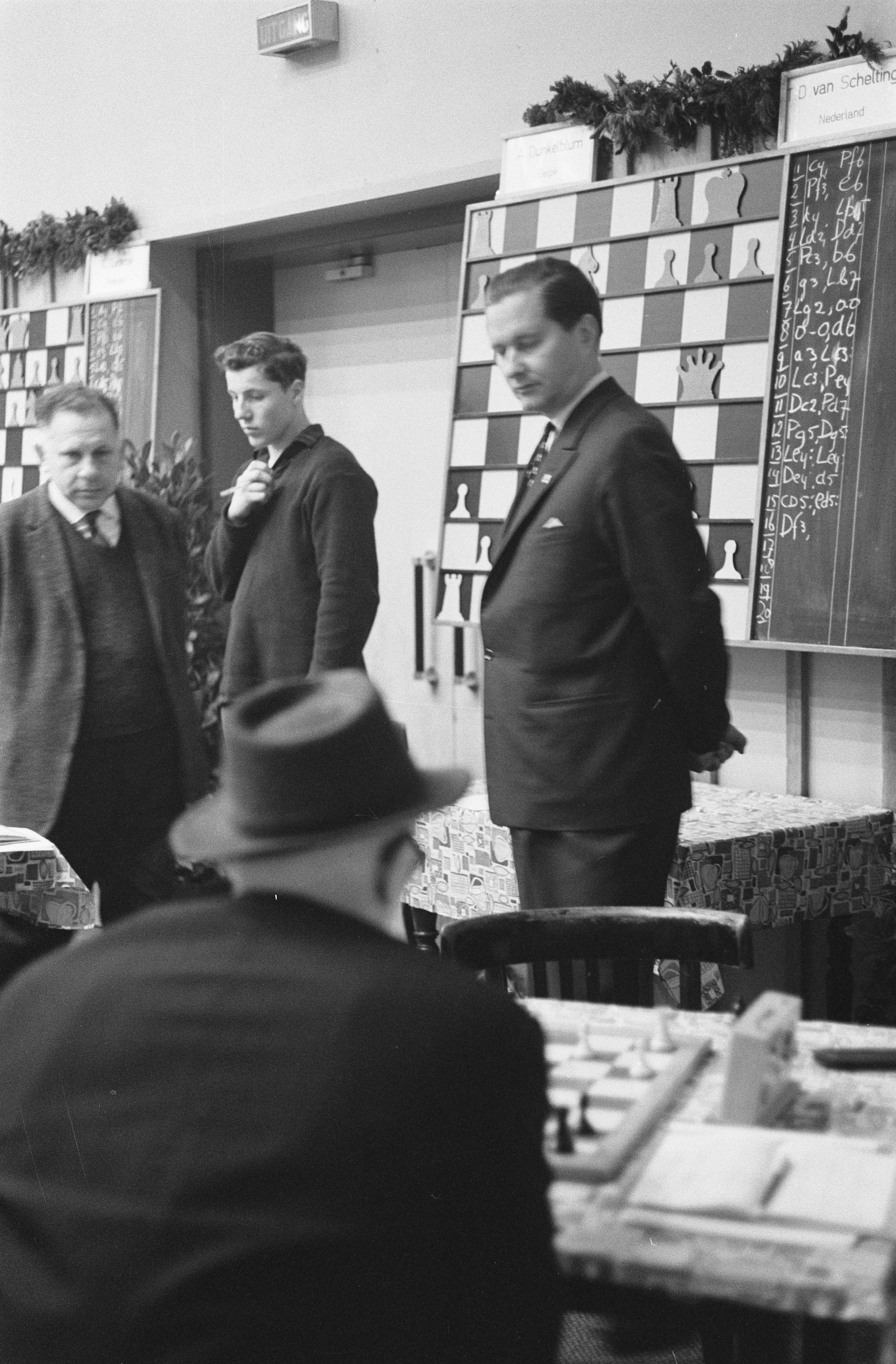 Collectie / Archief : Fotocollectie Anefo Reportage / Serie : [ onbekend ] Beschrijving : 26e Hoogovenschaaktoernooi te Beverwijk, Van Scheltinga Datum : 13 januari 1964 Locatie : Beverwijk Trefwoorden : schaken Instellingsnaam : Hoogovenschaaktournooi Fotograaf : Pot, Harry / Anefo Auteursrechthebbende : Nationaal Archief Materiaalsoort : Negatief (zwart/wit) Nummer archiefinventaris : bekijk toegang 2.24.01.05 Bestanddeelnummer : 915-9397